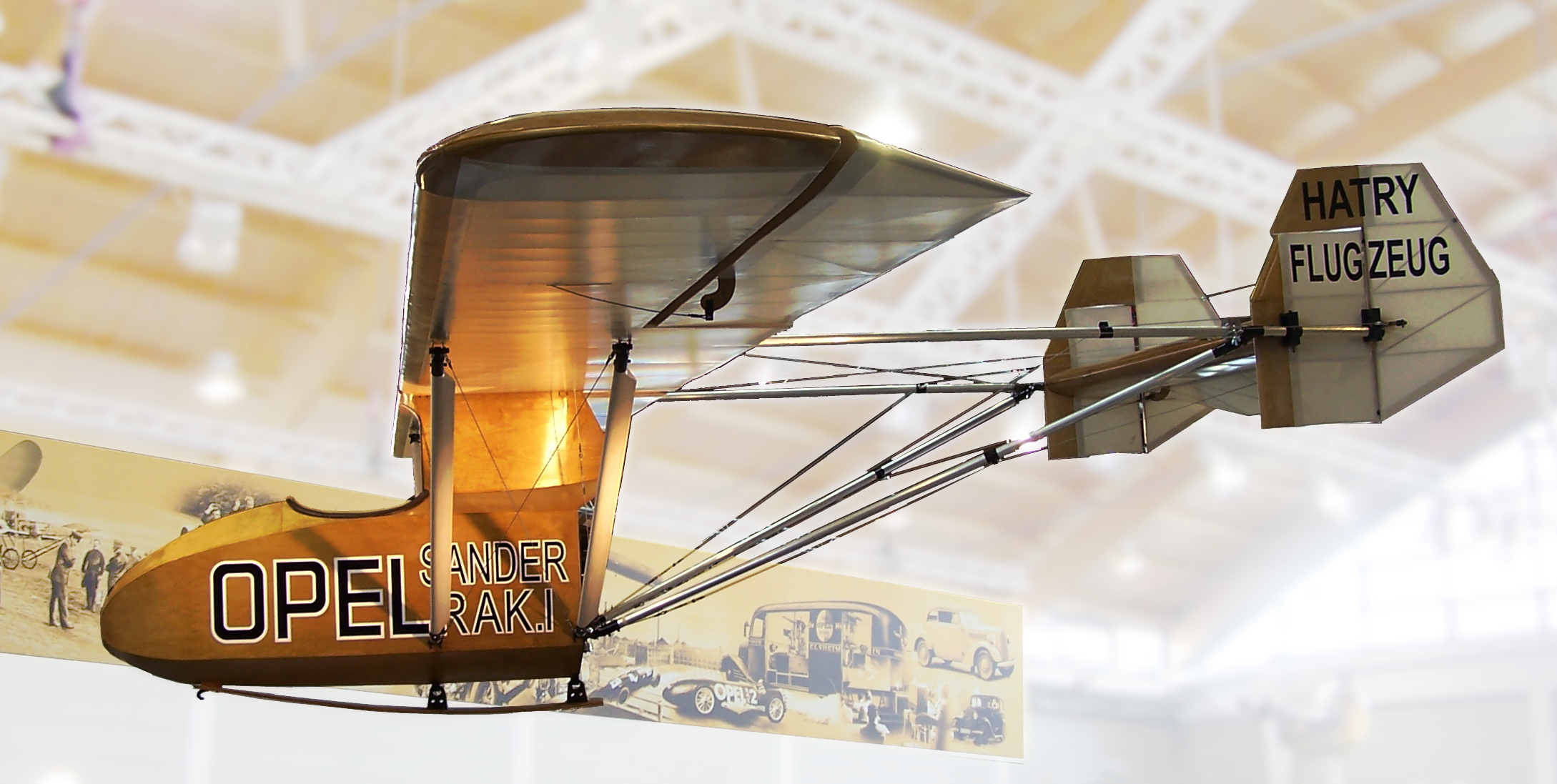 Nachbau des Opel-Sander RAK.1